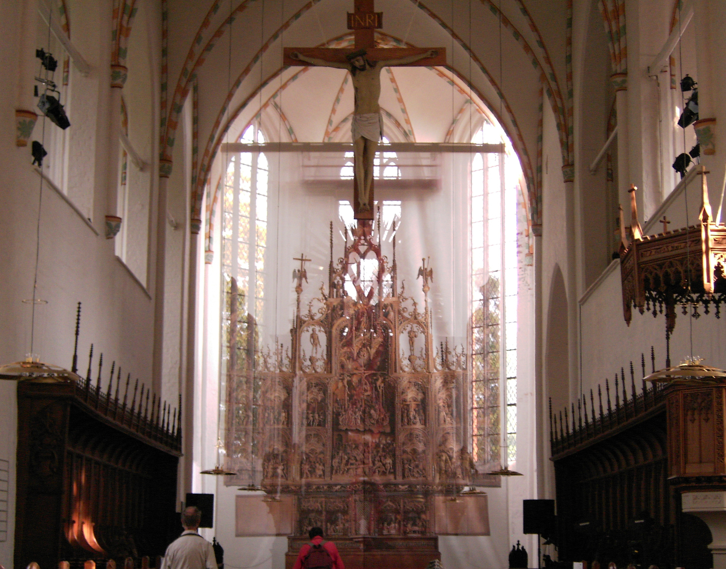 Projektion des Standortes des Brüggemann-Altar (heute Schleswiger Dom) an seinem ursprünglichen Standort in der Klosterkirche Bordesholm